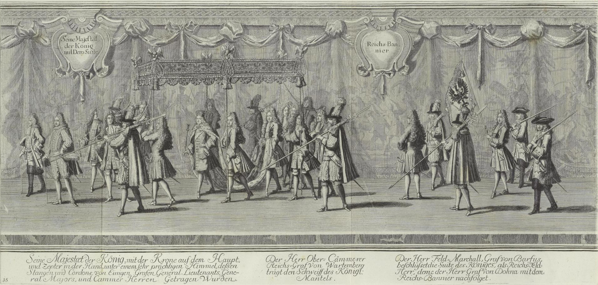 Der Königlich-Preüßischen Crönung Hochfeÿerliche Solemnitäten, Blatt 15 Seine Majestät der König mit Dero Suite Reichs-Bannier Seine Majestæt der König, mit der Krone auf dem Haupt und Zepter in der Hand, unter einem sehr prächtigen Himmel, dessen Stangen und Cordons von Einigen Grafen GeneralLieutenants, GeneralMajors und Cammer Herren Getragen Wurden Der Herr Ober-Cämmerer Reichs-Graf von Wartemberg trägt den Schweiff des Königl. Mantels Der Herr Feld-Marschall, Graf von Barfus, beschlüsset die Suite des Königes, als Reichs-Feld-Herr, deme der Herr Graf von Dohna mit dem Reichs-Bannier nachfolget